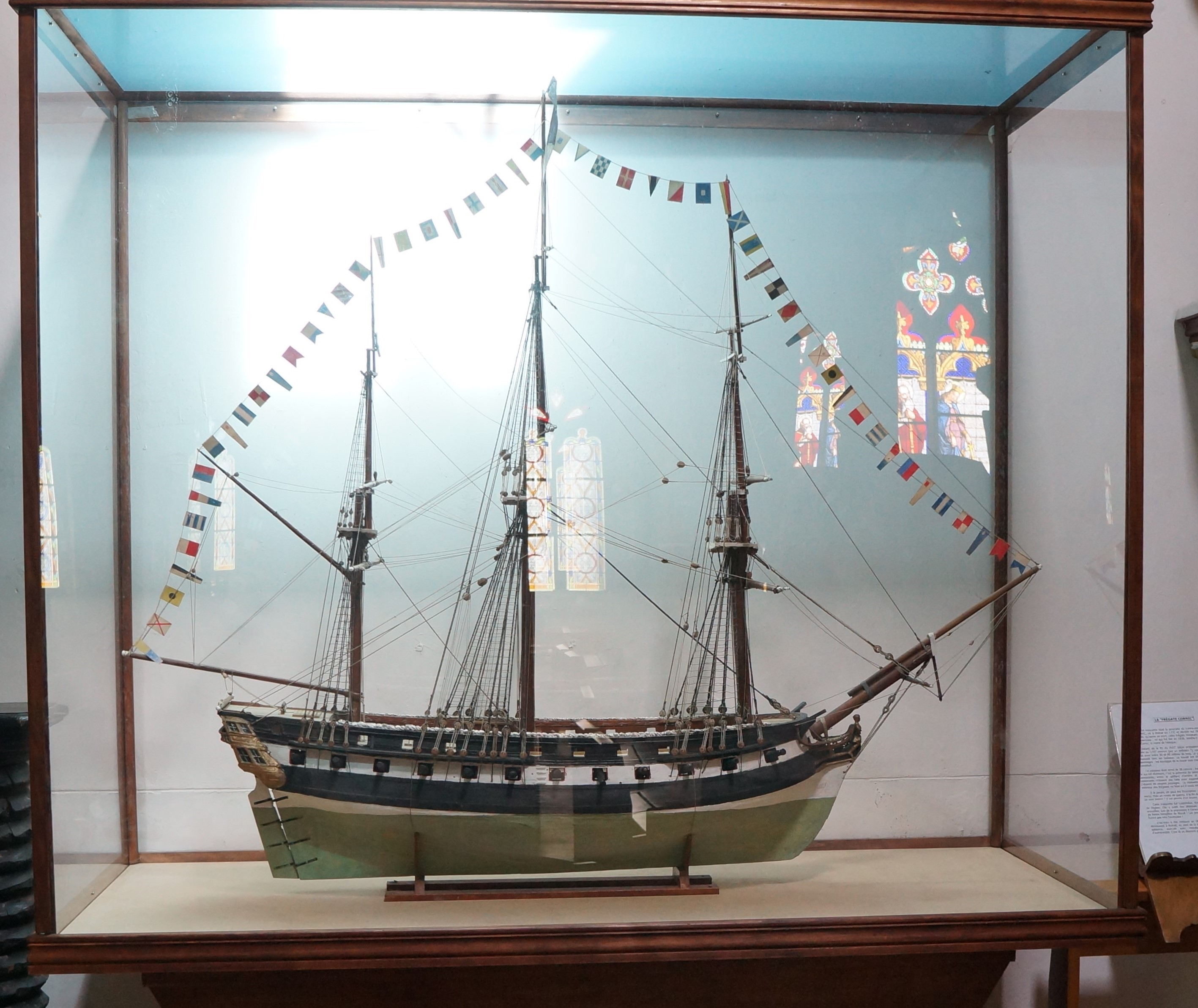 Maquette de la frégate, "Reder mor", leg de l'amiral Cornic, à Eglise Notre-Dame de Bonne-Nouvelle. Cet ex-voto fut longtemps suspendu à la voûte de l'église Notre-Dame de Bonne Nouvelle. Traditionnellement, chaque 15 août, cette maquette était portée en procession par quatre marins jusqu'à la chapelle de Keranroux.